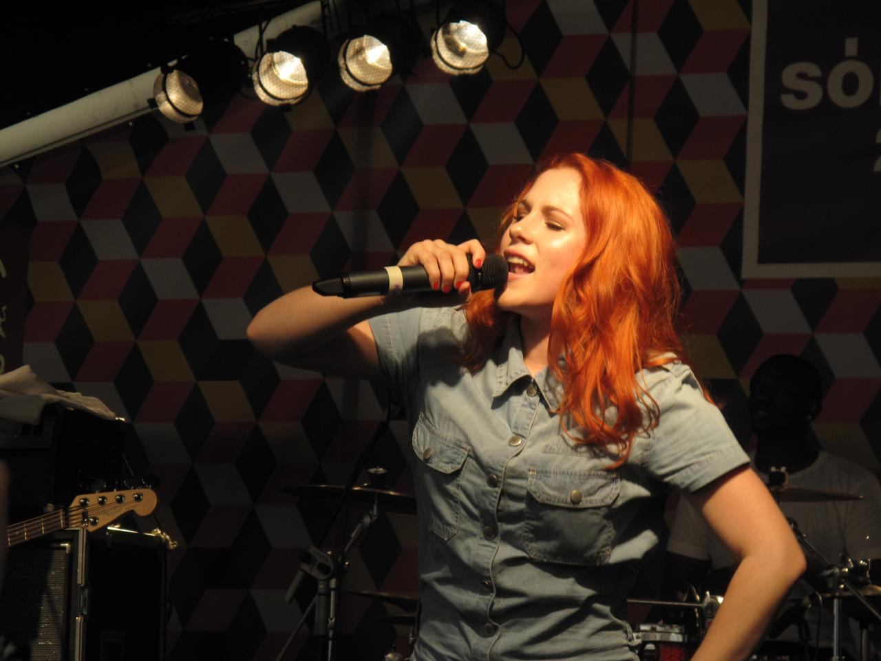 Katy B at Sonar 2011.